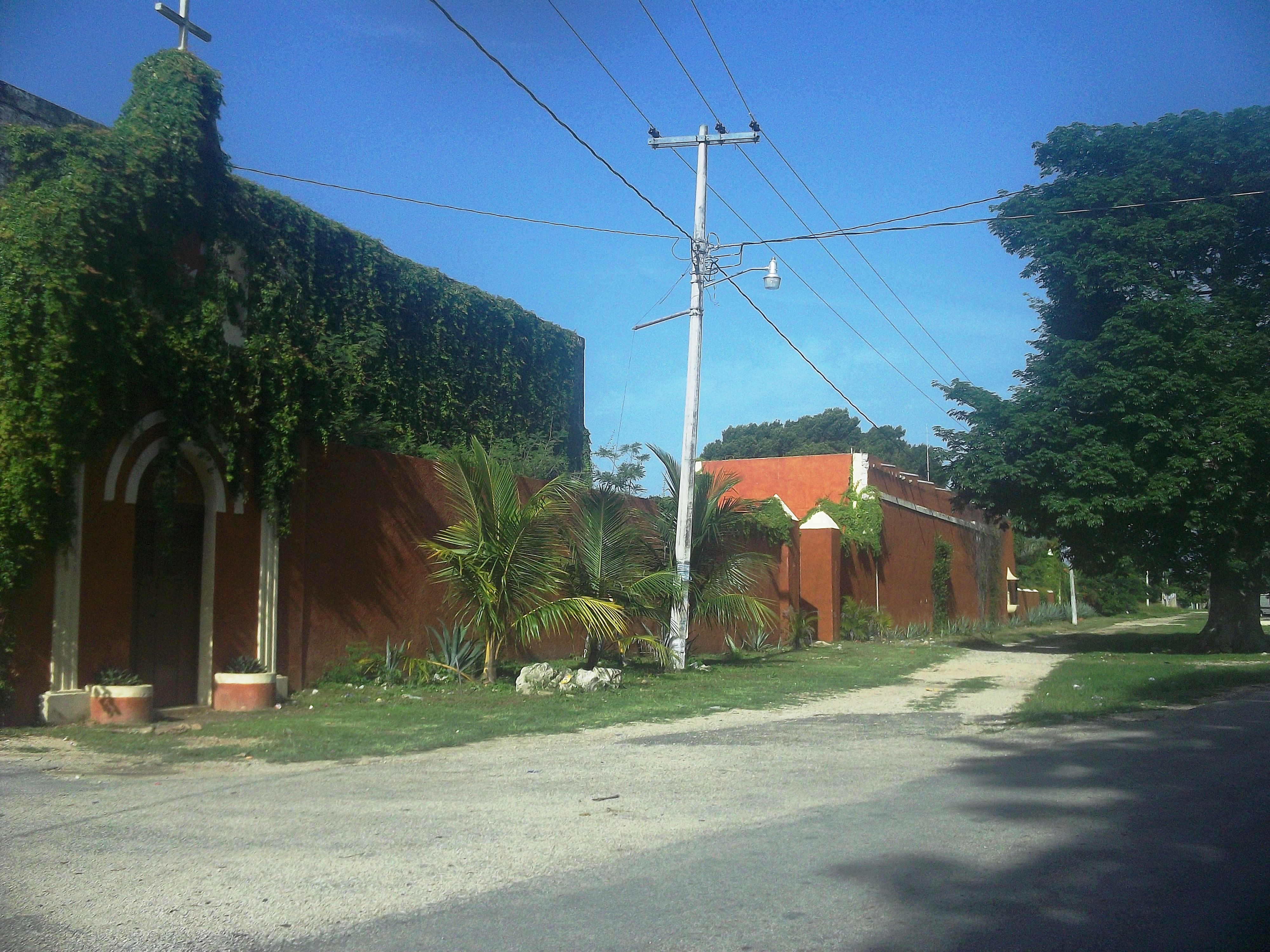 Vista de la hacienda de Pozo de Dzibikak, Yucatán..